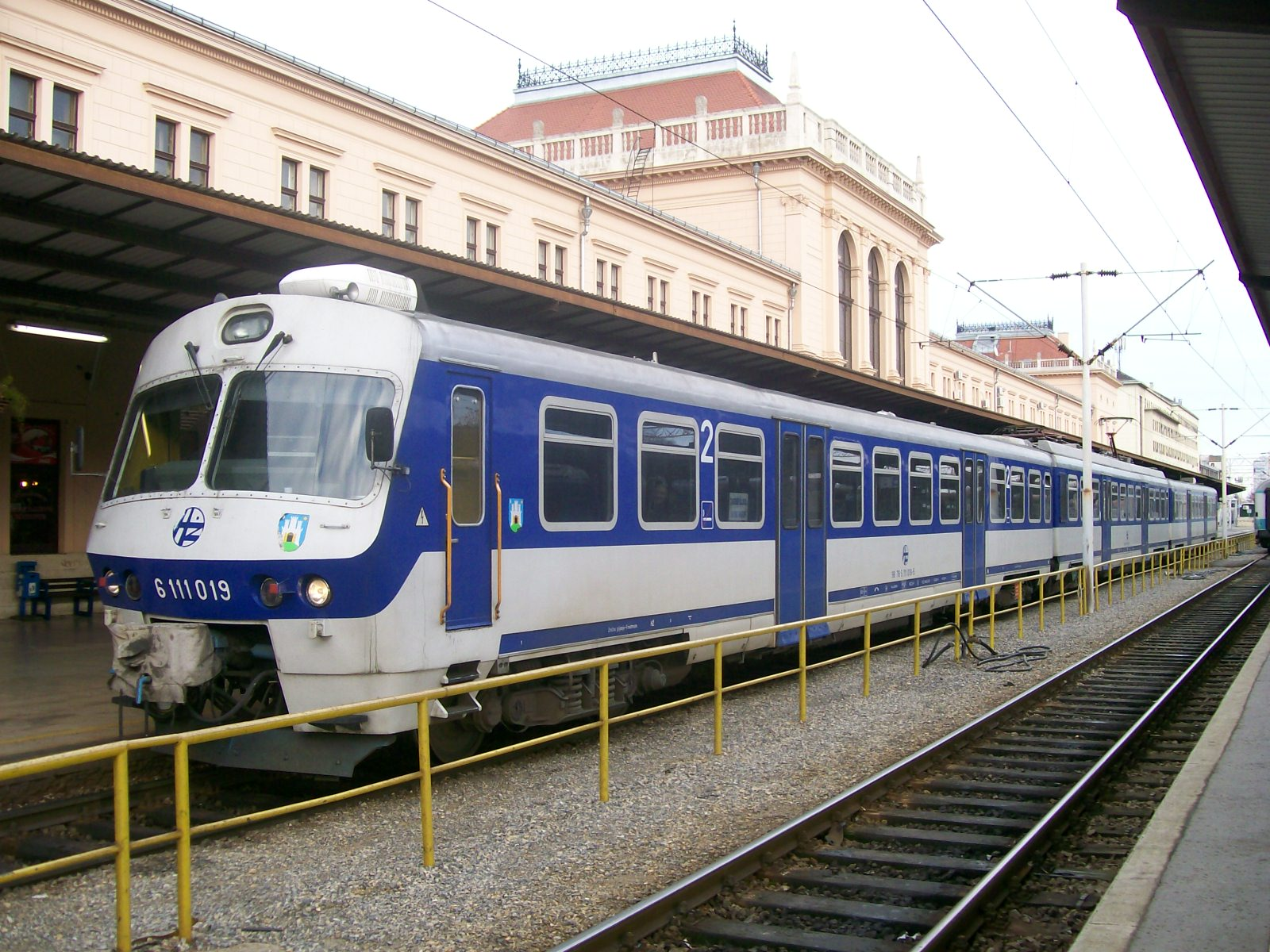 HŽ 6111 serie train in Zagreb